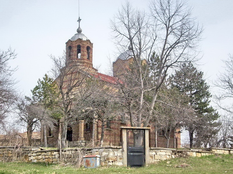 Село Ковачевец, община Попово. Църковният храм